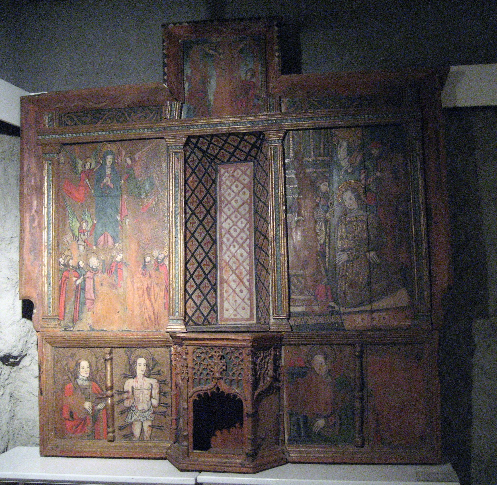 Retablo de Santa Coloma del siglo XVI perteneciente a La Bastida d'Hortons de la comarca catalana del Alto Urgel (Spain)